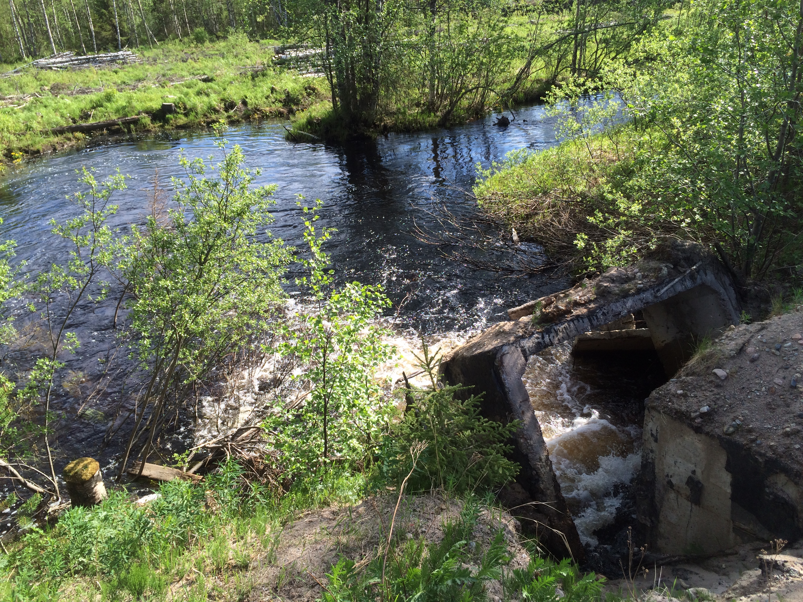 река Кулат